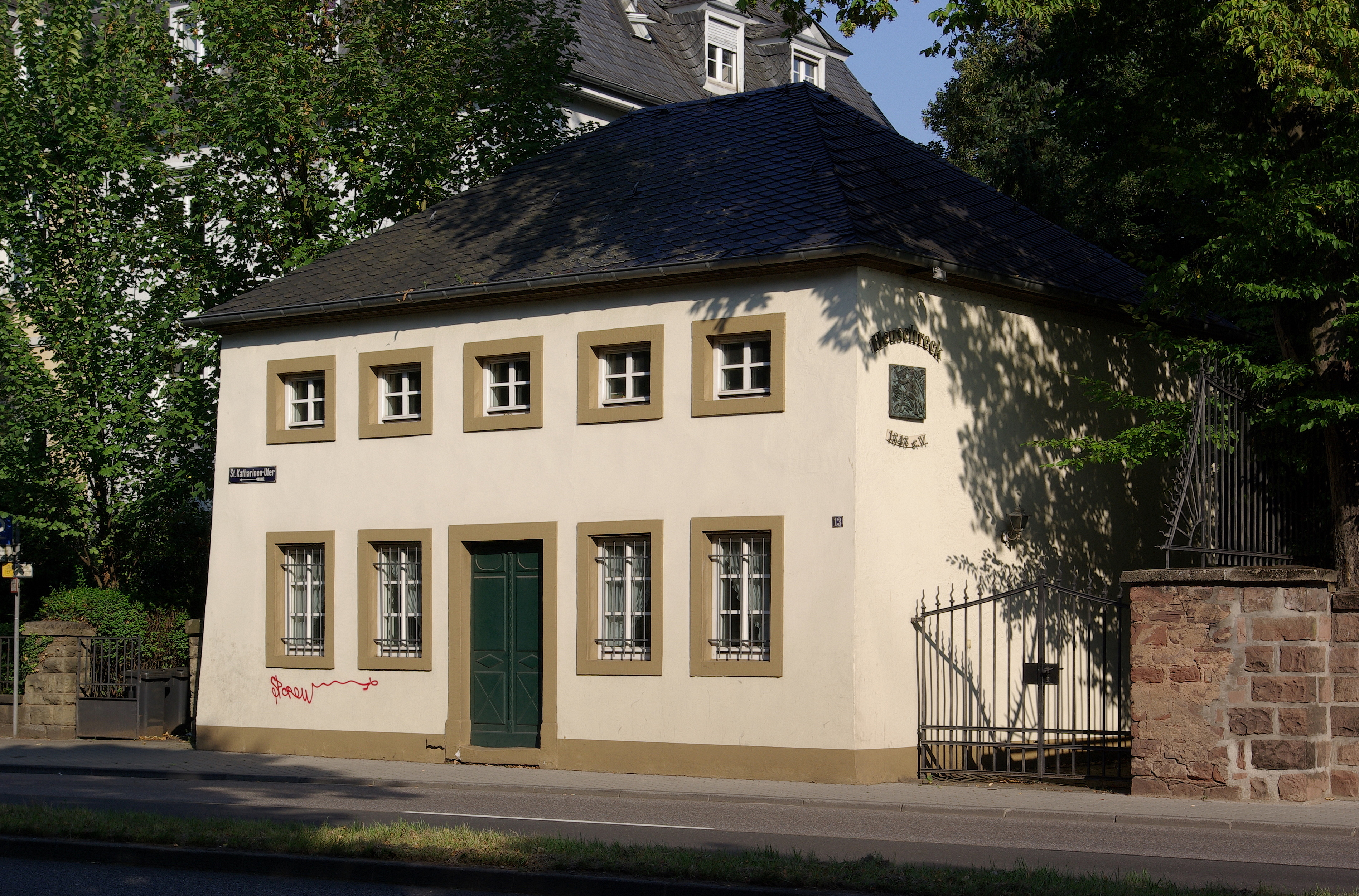 Trier, Altes Zollhaus, ehemaliges Pförtnerhaus des Katharinentores, klassizistischer Walmdachbau von 1815. Heute im Besitz des Karnevalvereins Heuschreck